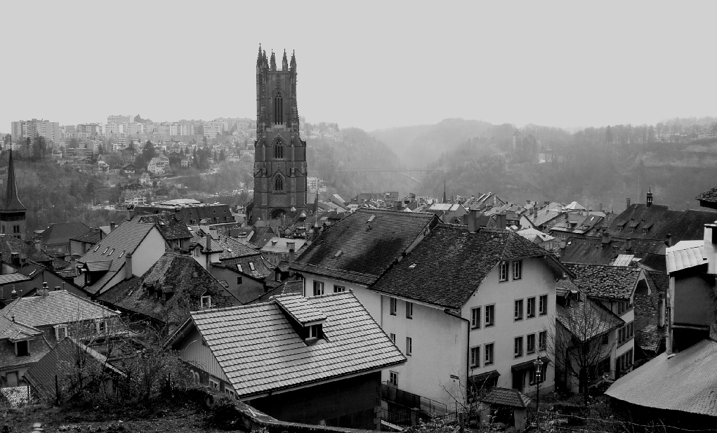 Die Stadt Freiburg vom Collège St-Michel aus gesehen. Links im Hintergrund das Quartier Schönberg. In der Mitte der Galterngraben.